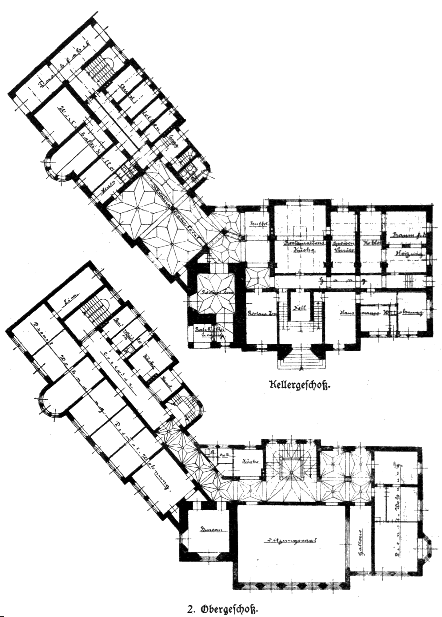 Berlin, Rathaus Schmargendorf, Grundrisse